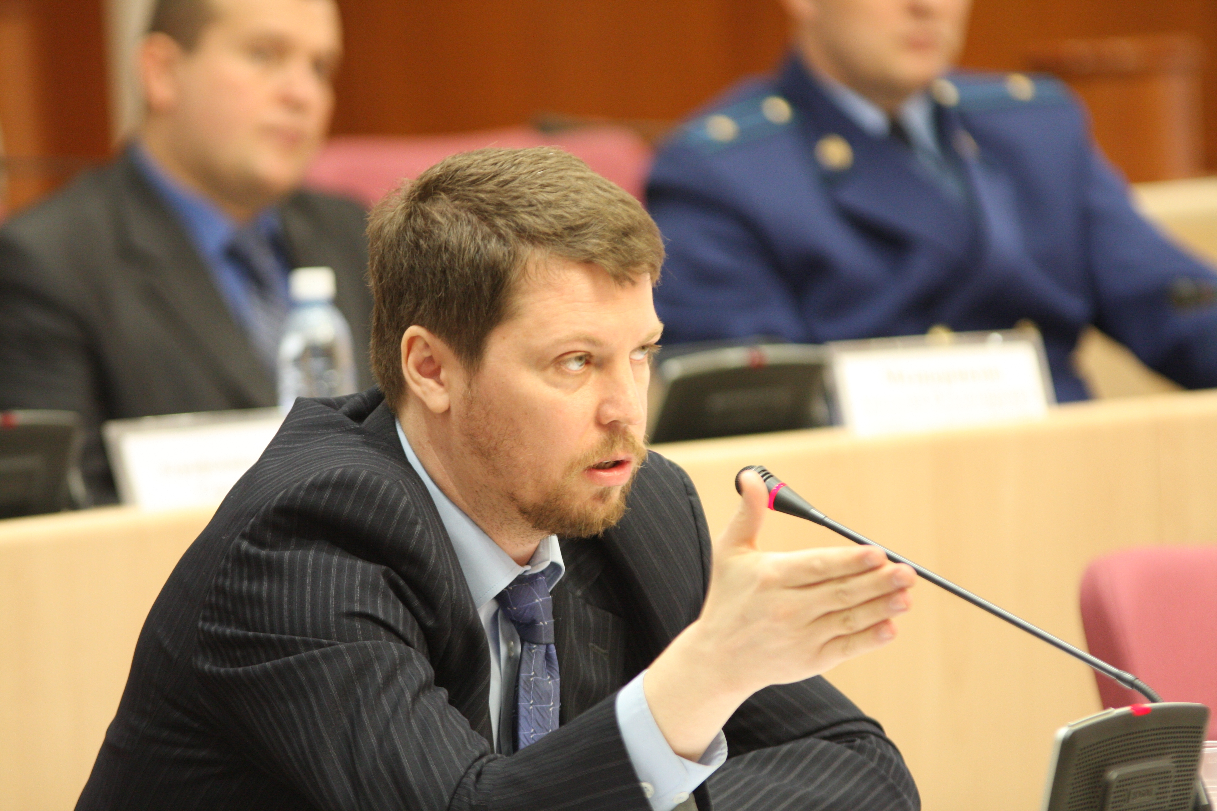 На заседании Самарской Губернской Думы, 2011